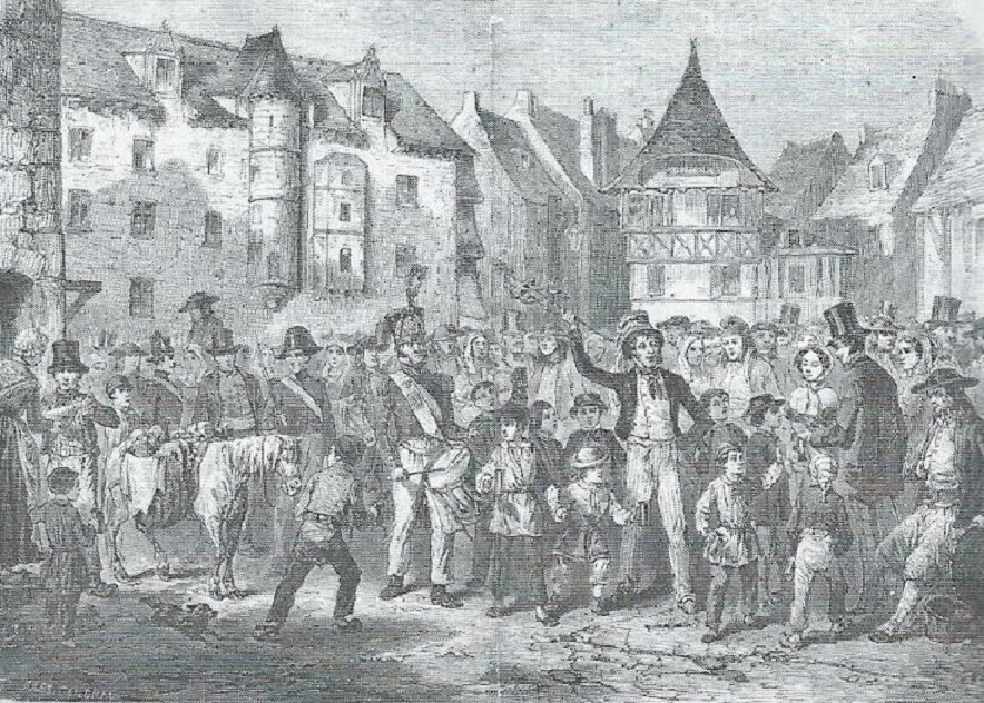 Max Radiguet (1816-1899) : La quête de l'épigane (une tradition ancienne dans la ville de Lesneven) (L'Illustration, 1854)